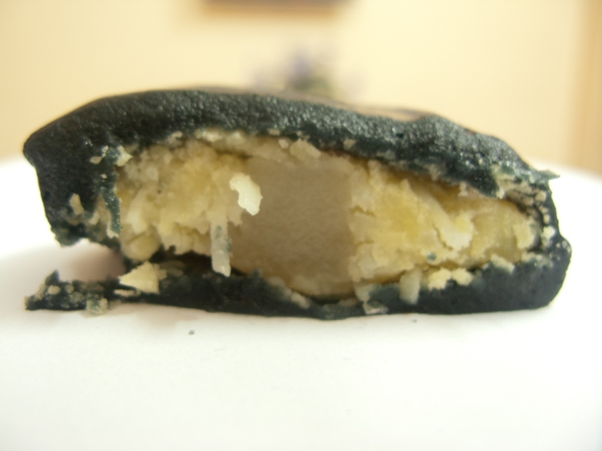 Bánh gai Nam Định nhân dừa nạo, đậu xanh, hạt sen, thịt mỡ.